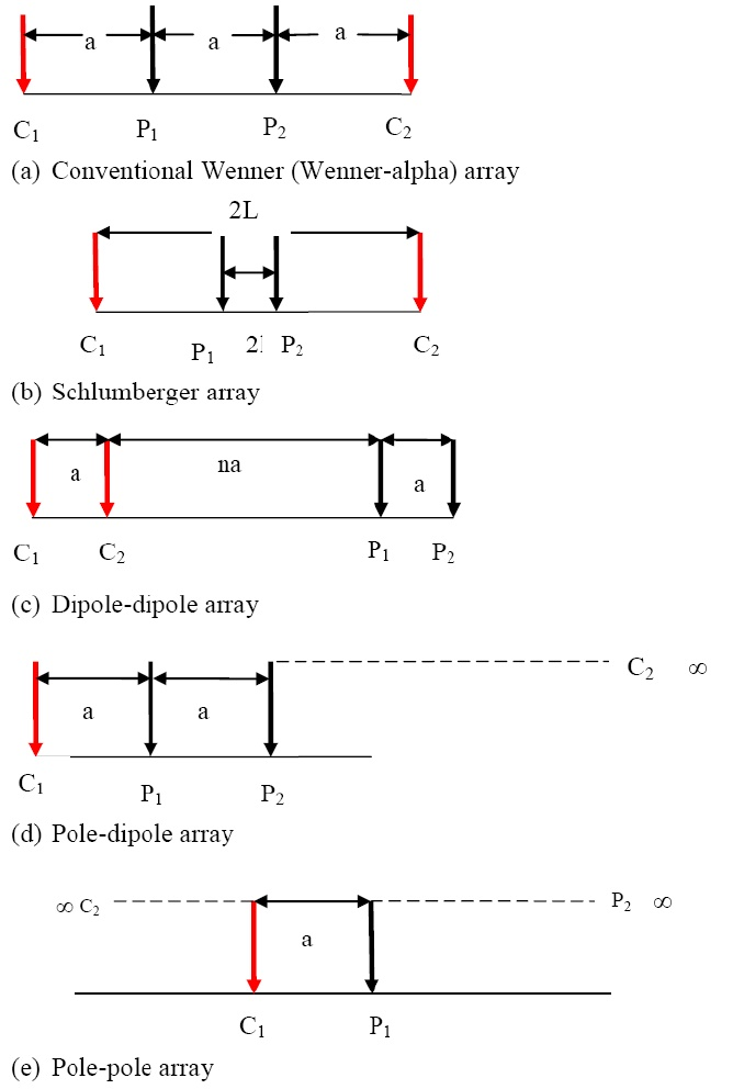 انواع روش های ژئوالکتریک